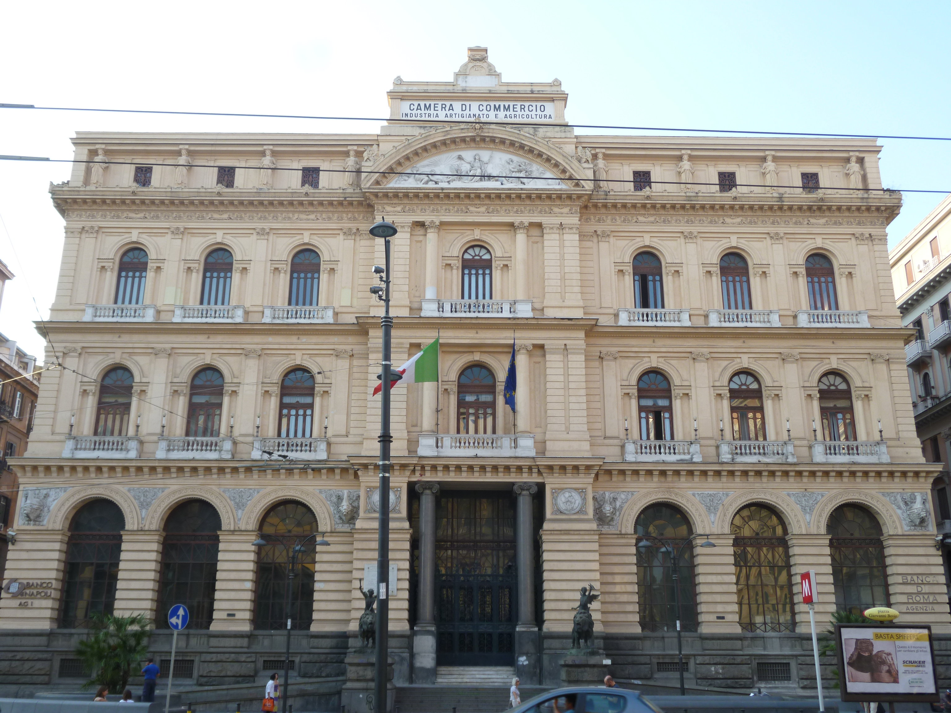 Napoli